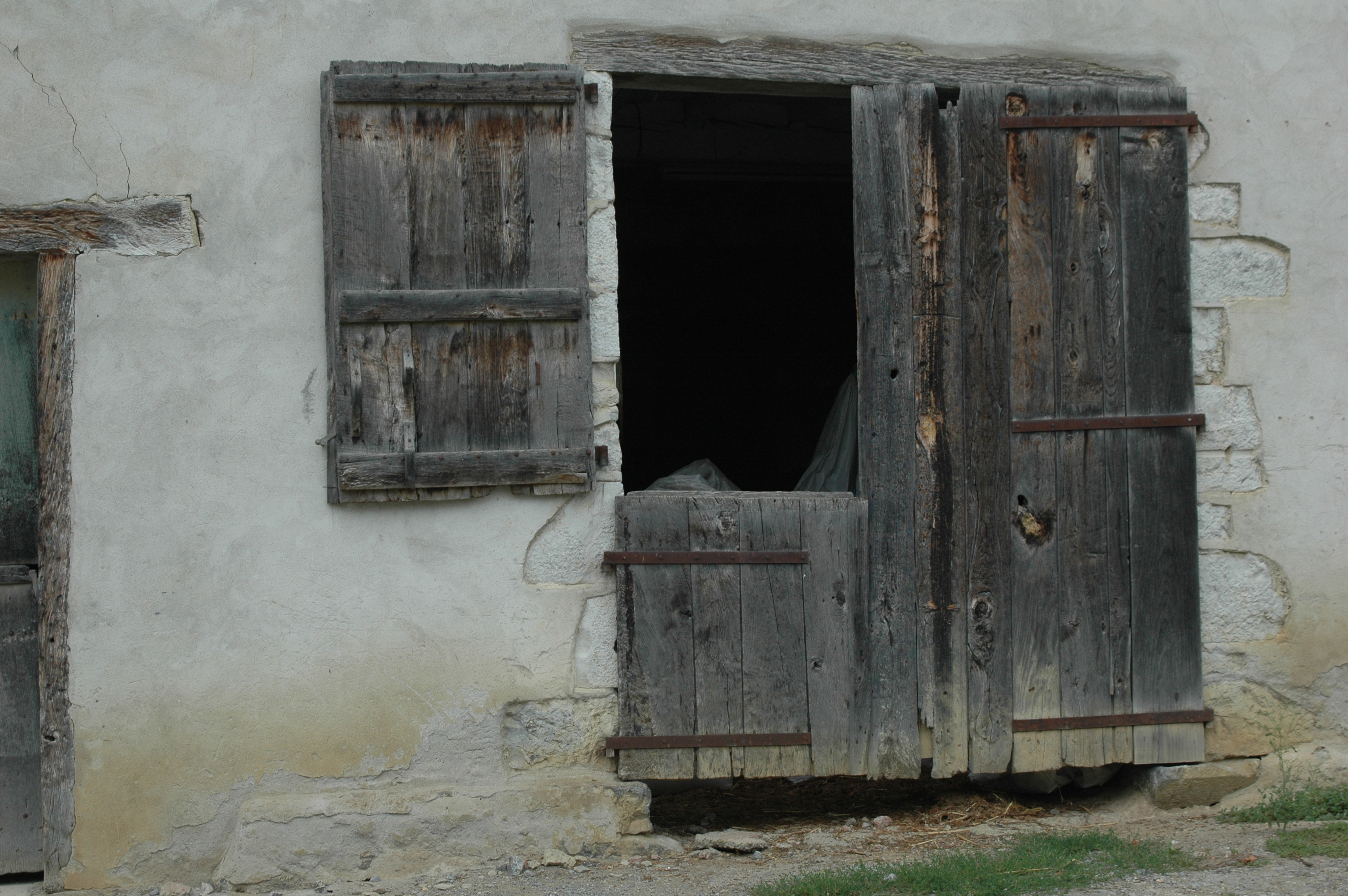 Porte de ferme à Ainhice-Mongelos